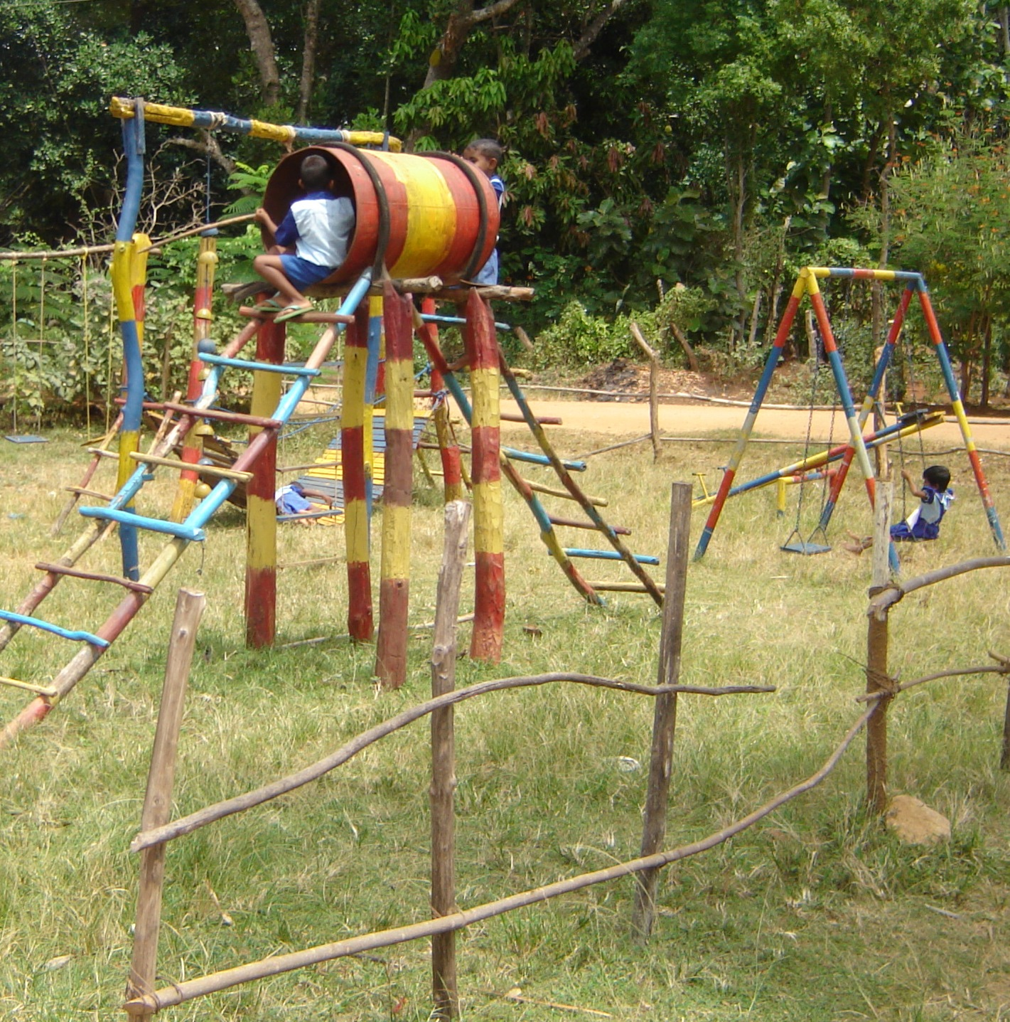 සිංහල: ශ්‍රී ලංකාවේ ගමක ලදරු පාසලක ඇති අඩු වියදම් සෙල්ලම් මිදුලක්